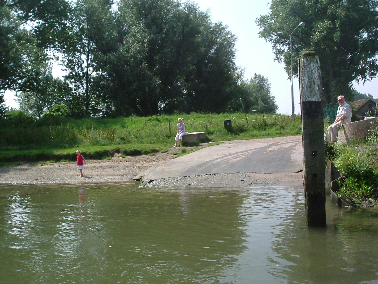 Trailerhelling aan de Loswalweg in Dordrecht.